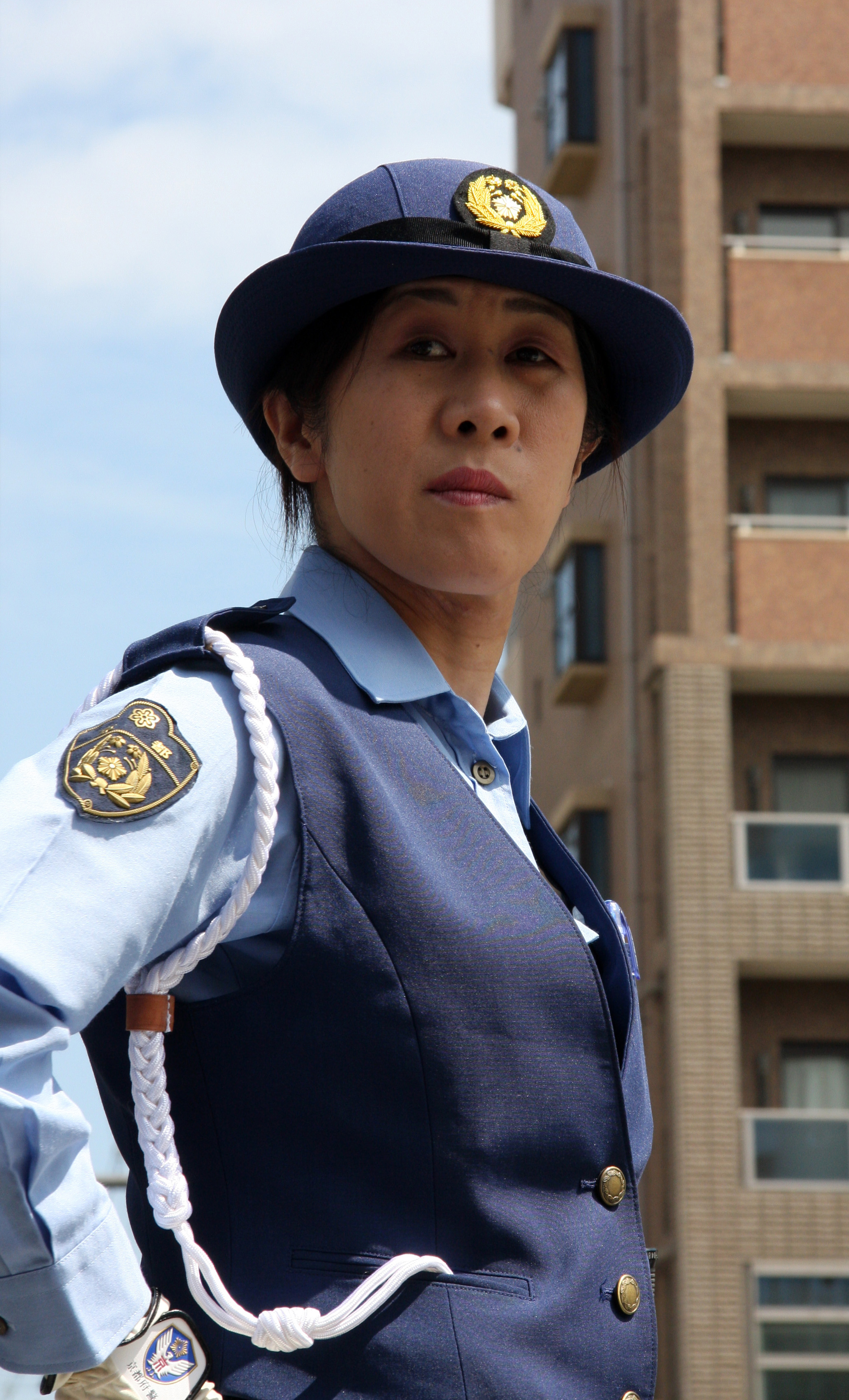 Une femme policière de police de Kyōto.